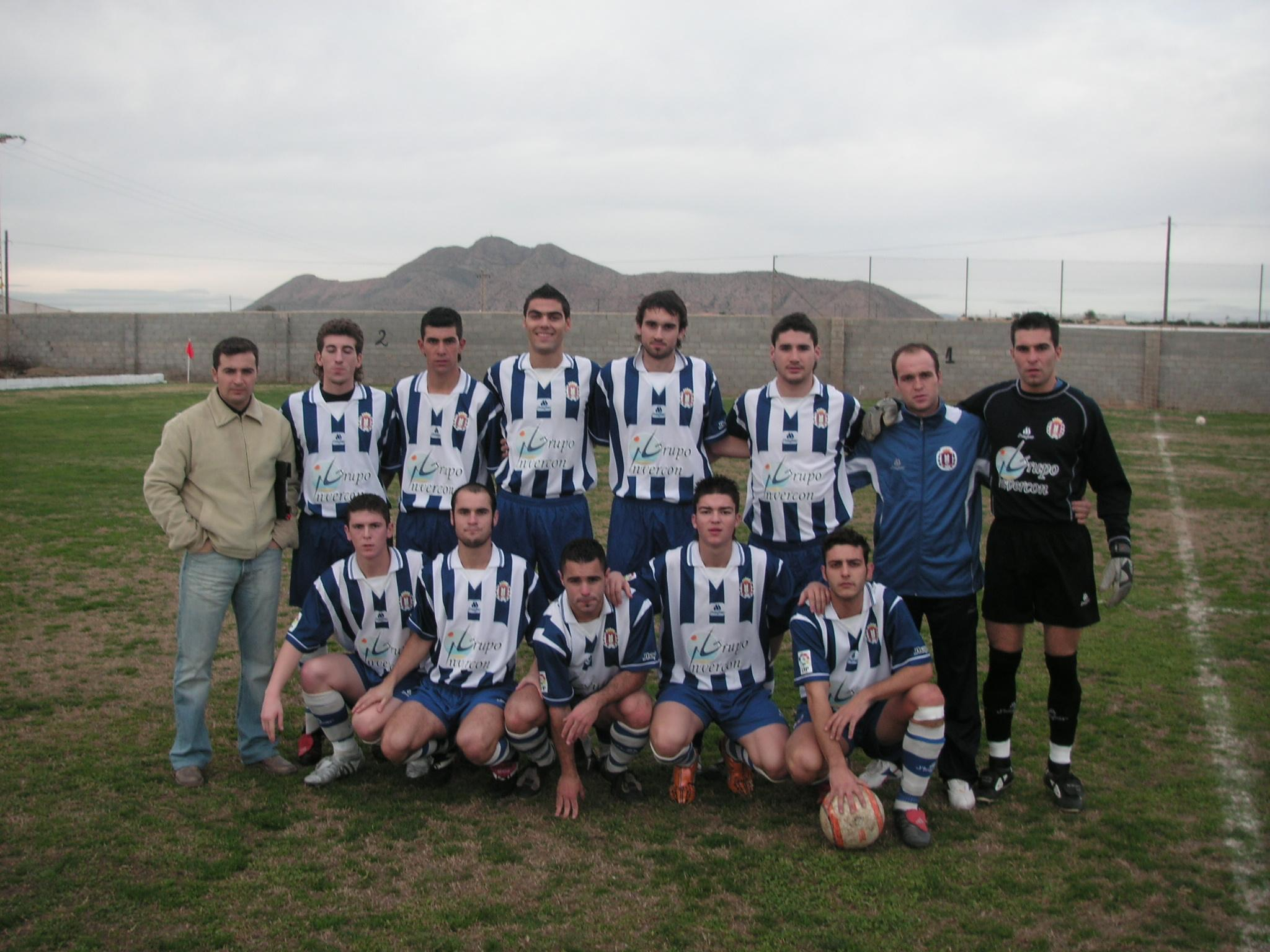 Una alineación del Lorca Deportiva CF B